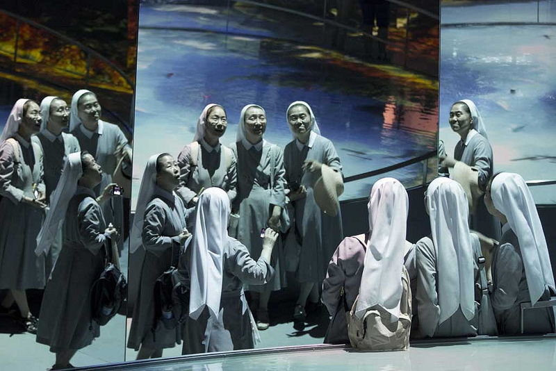 Klosterfrauen im Bereich Quelle des Schweizer Pavillons Expo 2012 Yeosu